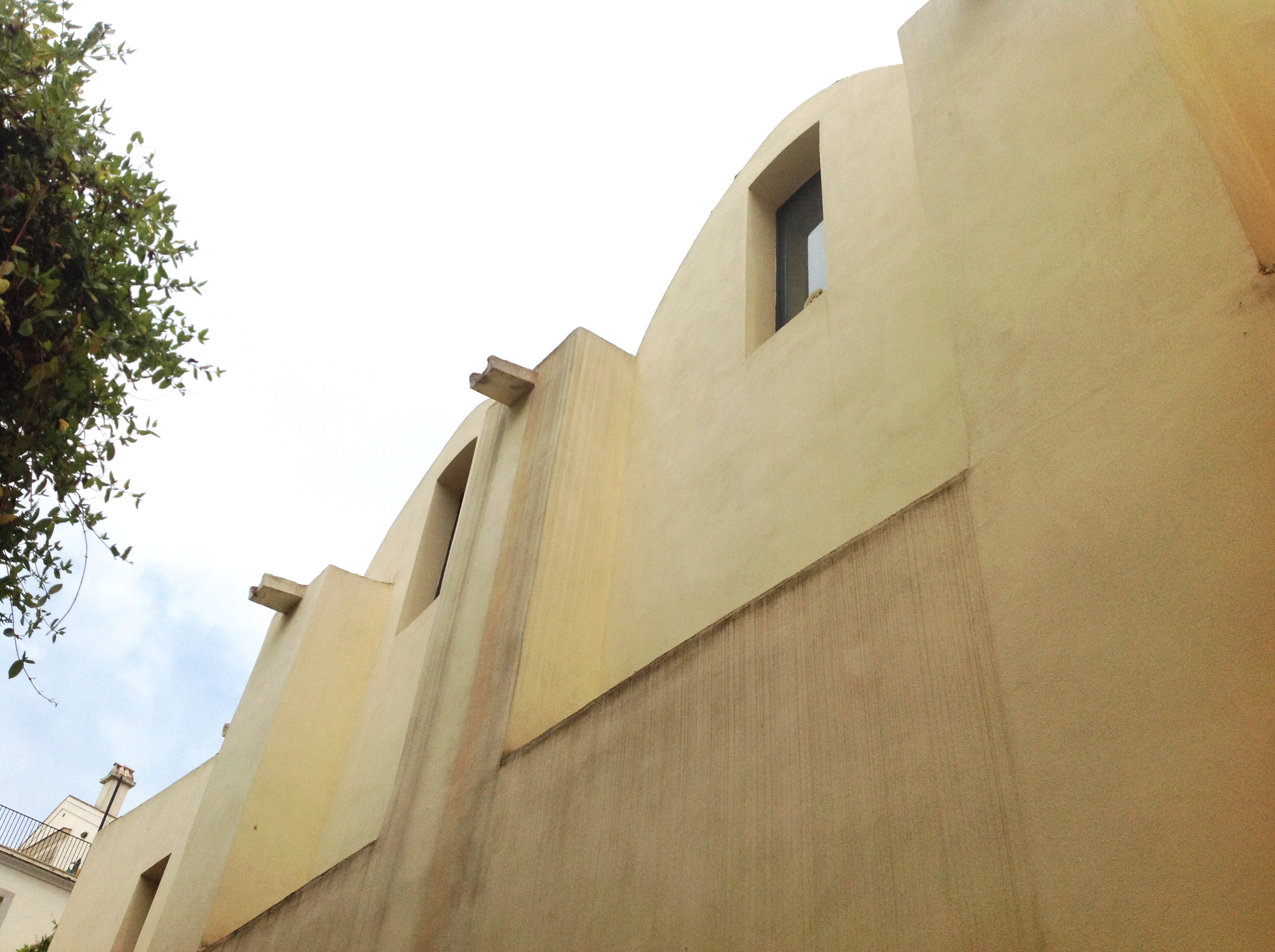 Contrafforti del XIII secolo lungo la fiancata sinistra.